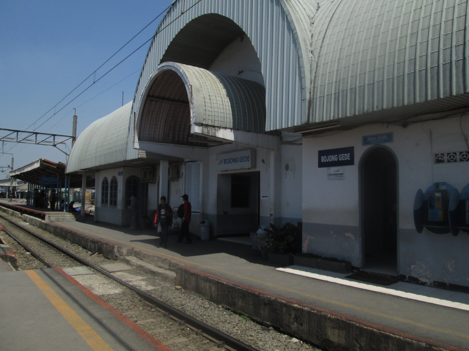 Stasiun Bojong Gede